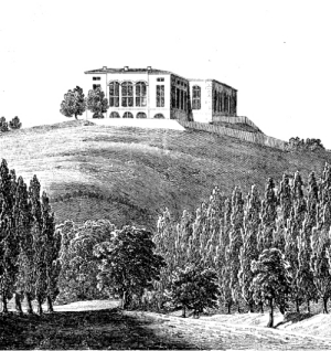 Sternwarte auf dem kleinen Seeberg bei Gotha. Original-Stahlstich, ca. 7,5 x 10 cm. Ansicht der Sternwarte auf einem hohen Hügel. Im Vordergrund eine Pappelallee.